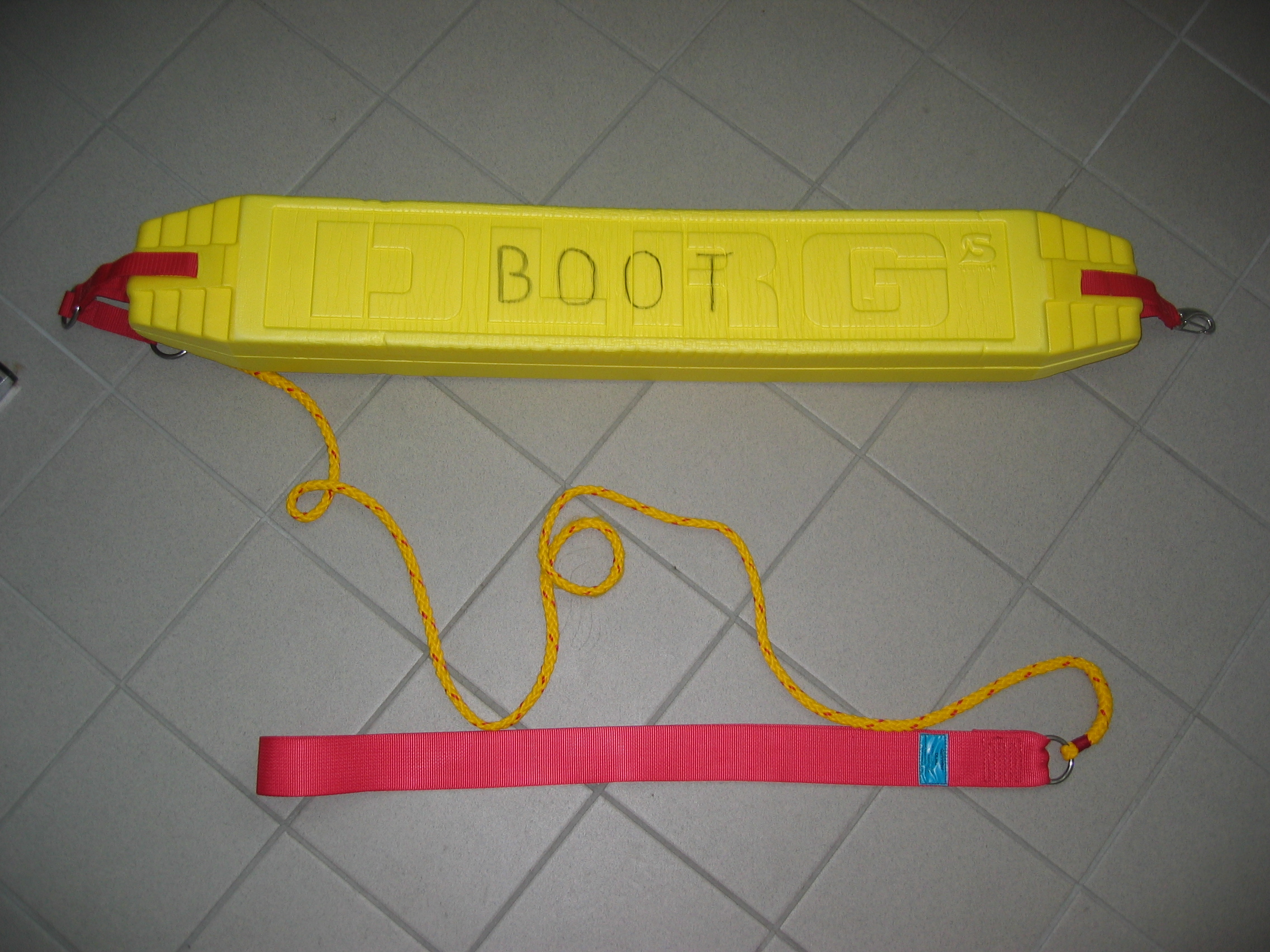 Die neue, pfegeleichtere Version des Gurtretters